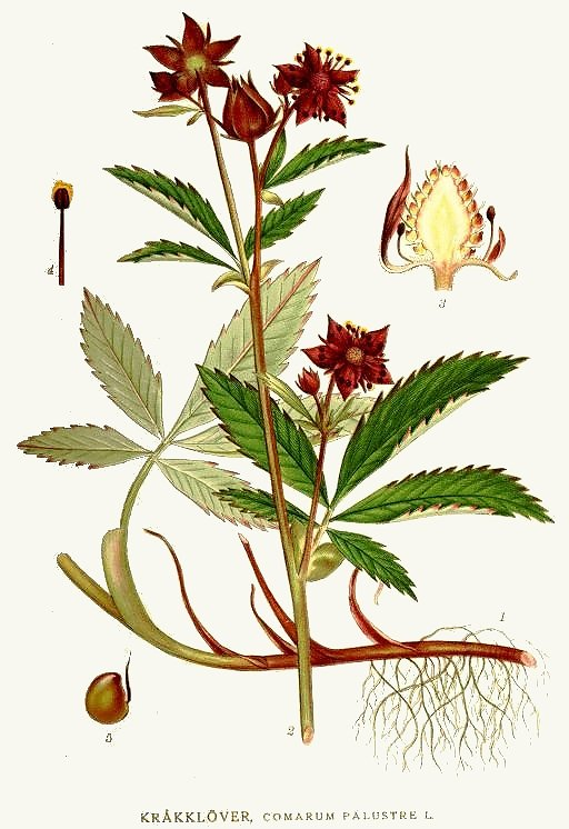 Potentilla palustris (L.) Scop., syn. Comarum palustre L. Original Description Kråkklöver, Comarum palustre L.